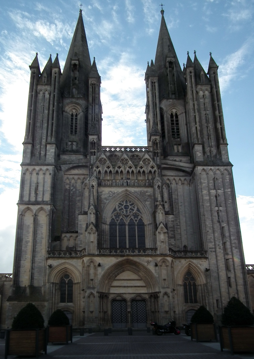 Cathédrale Notre-Dame de Coutances, Coutances, France